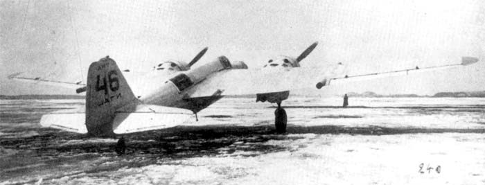 АНТ-46 на испытаниях. Фото ЦАГИ.